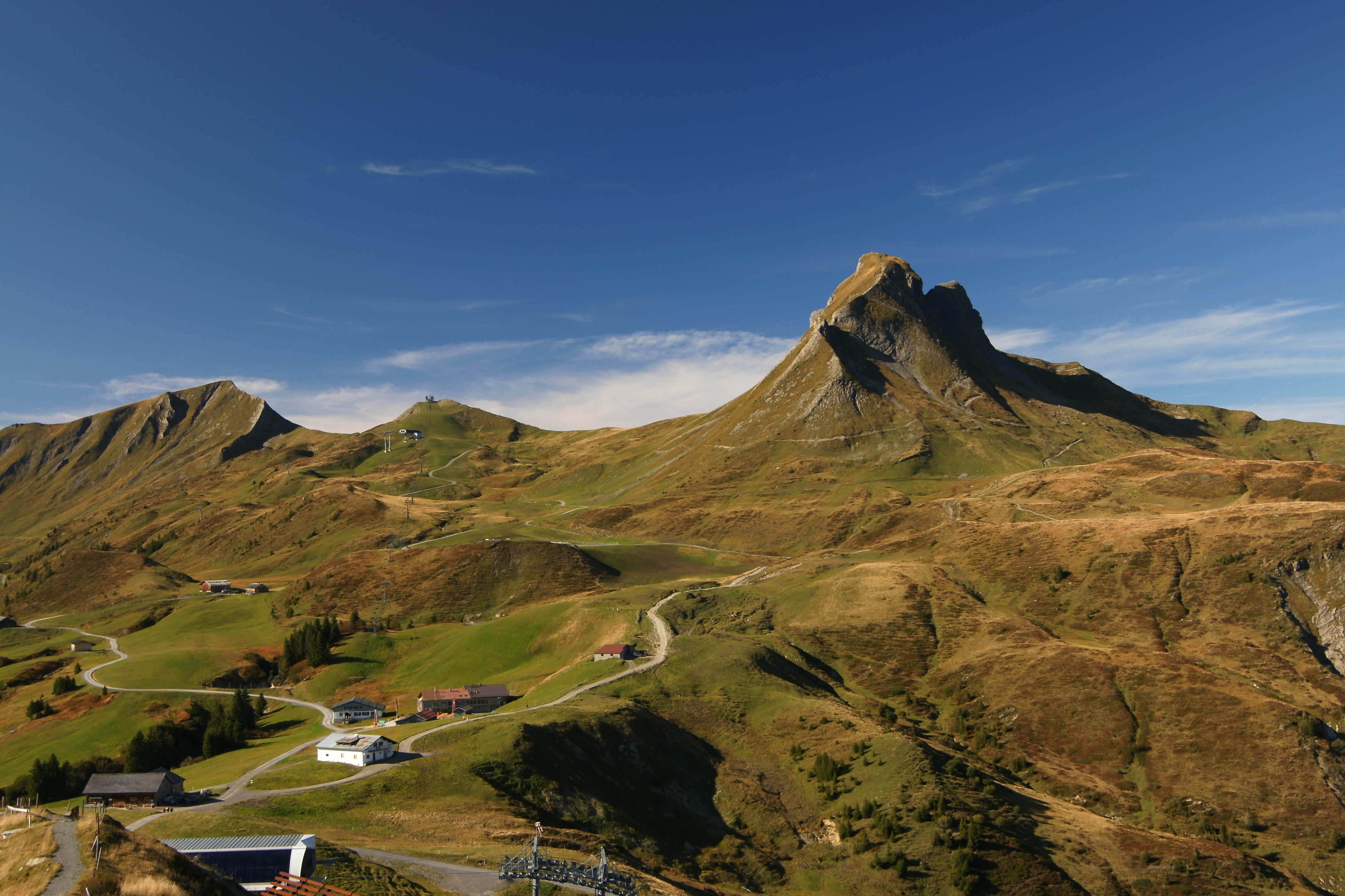 „rechts“ Damülser Mittagsspitze 2095m „mitte“ Bergbahn auf das Hohe Licht 2009m „links“ der Hochblanken 2068m Blick von der Eisenalpstube neben der Bergstation “Uga Express” .